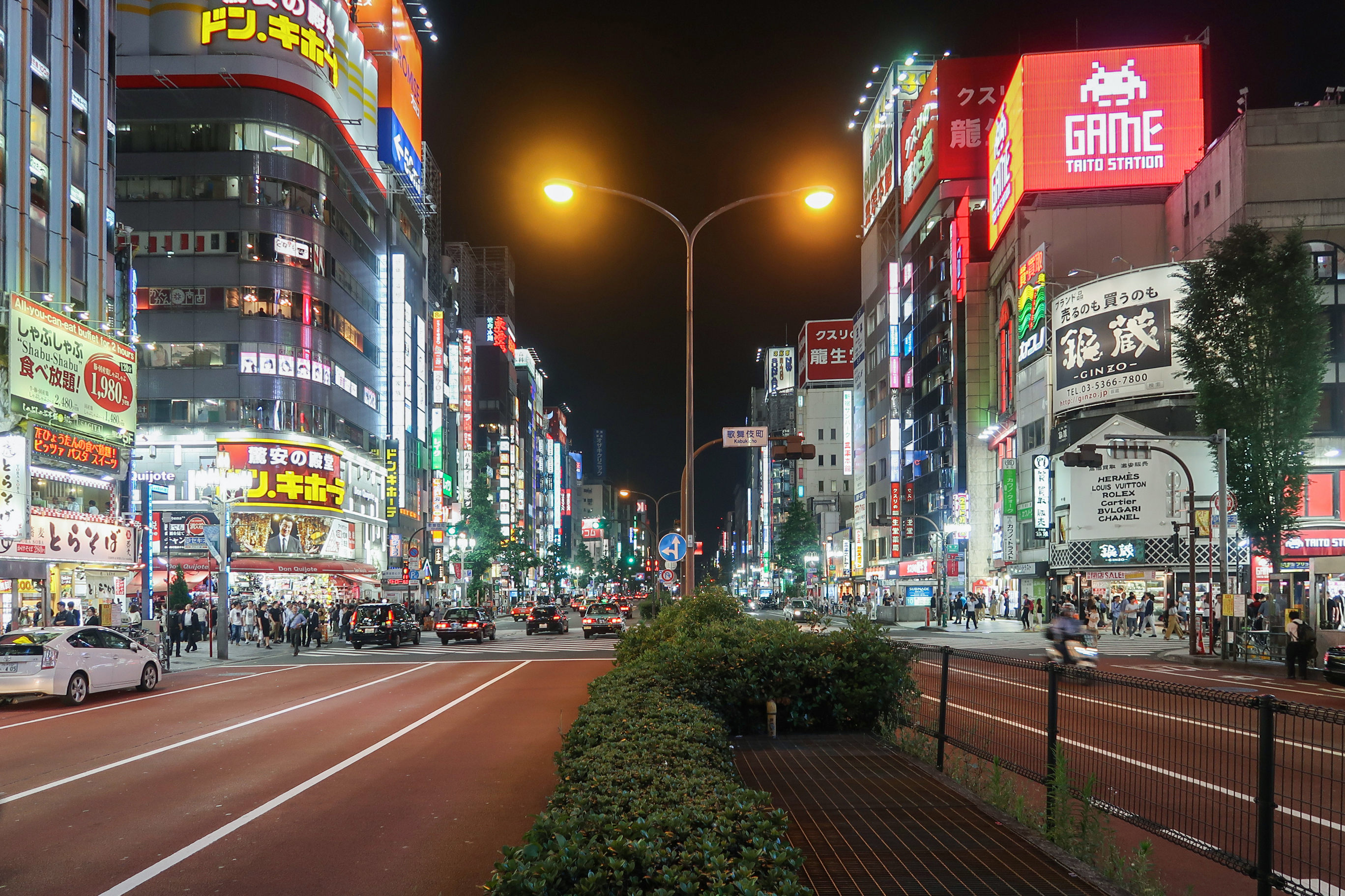 Yasukuni Dori, Shinjuku